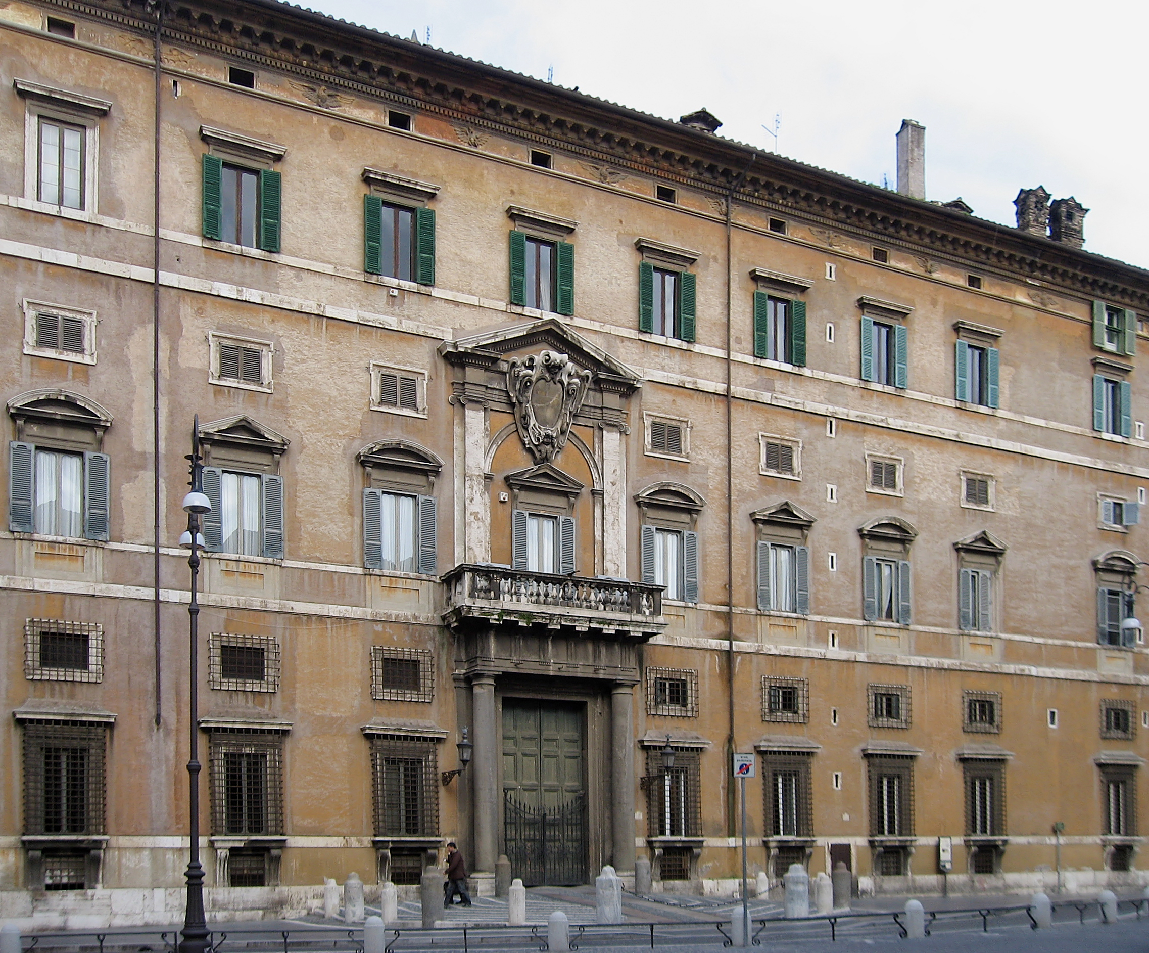 Fassade des Palazzo Borghese an der Piazza Borghese in Rom/Italien